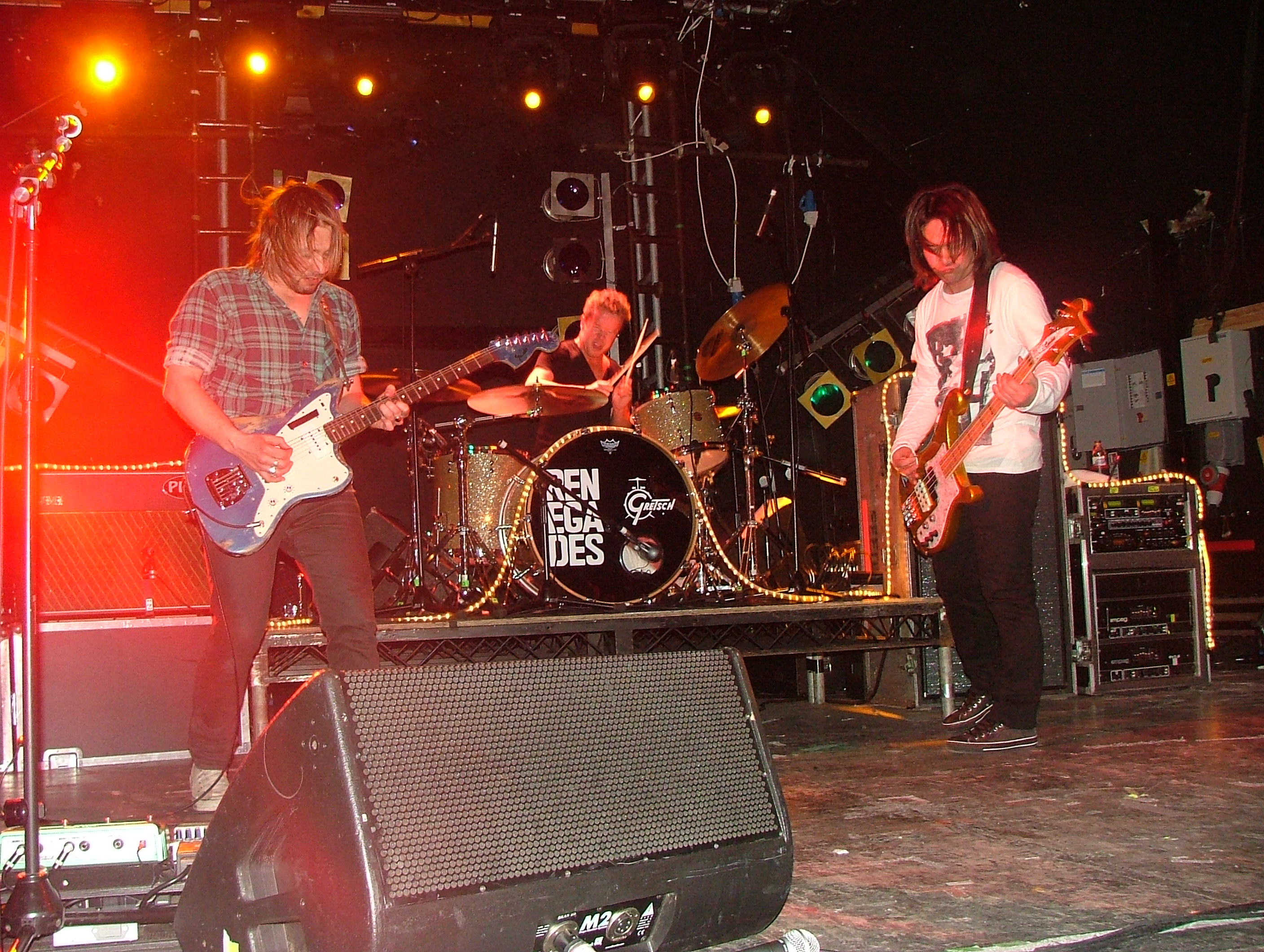 Renegades at a concert in Camden, London 2010